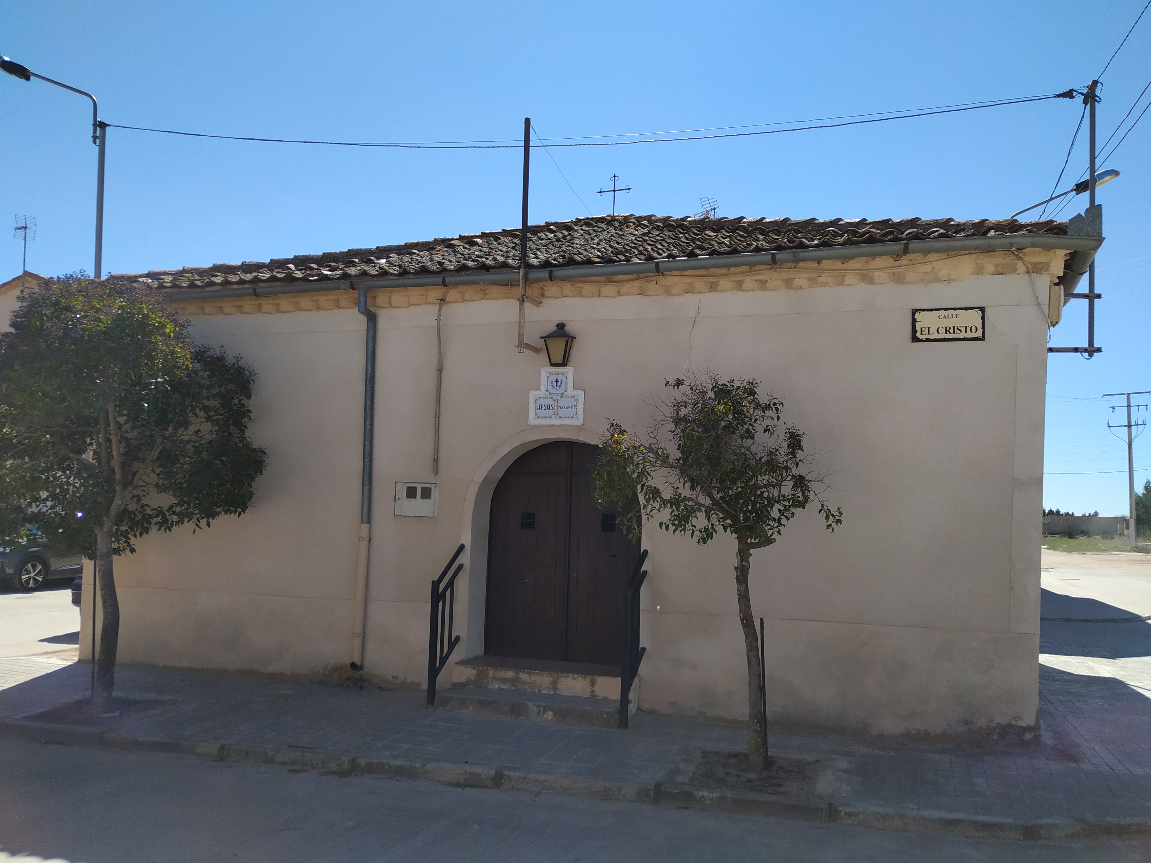 Es una ermita del pueblo de Mozoncillo, en Segovia. Existiendo otras de mayor importancia, esta se usa ocasionalmente